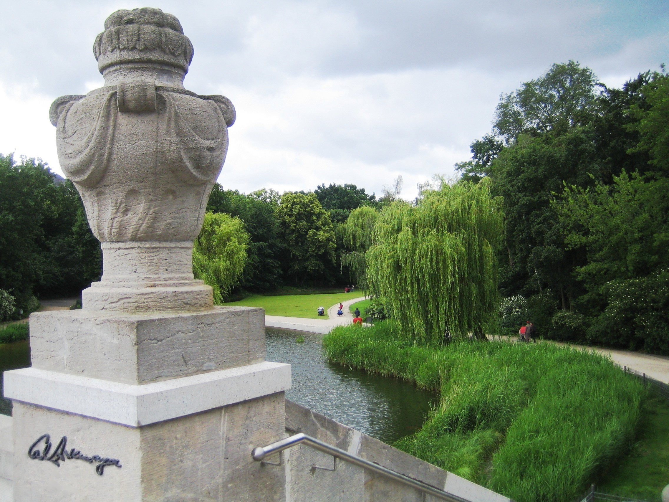 Berlin, Rudolph-Wilde-Park. Blick von der Carl-Zuckmayer-Brücke (s. Schriftzug links unten) Richtung Westen.